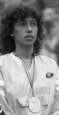 Summer Universiade in Bucharest. Virginia Ruzici and Florența Mihai (right)